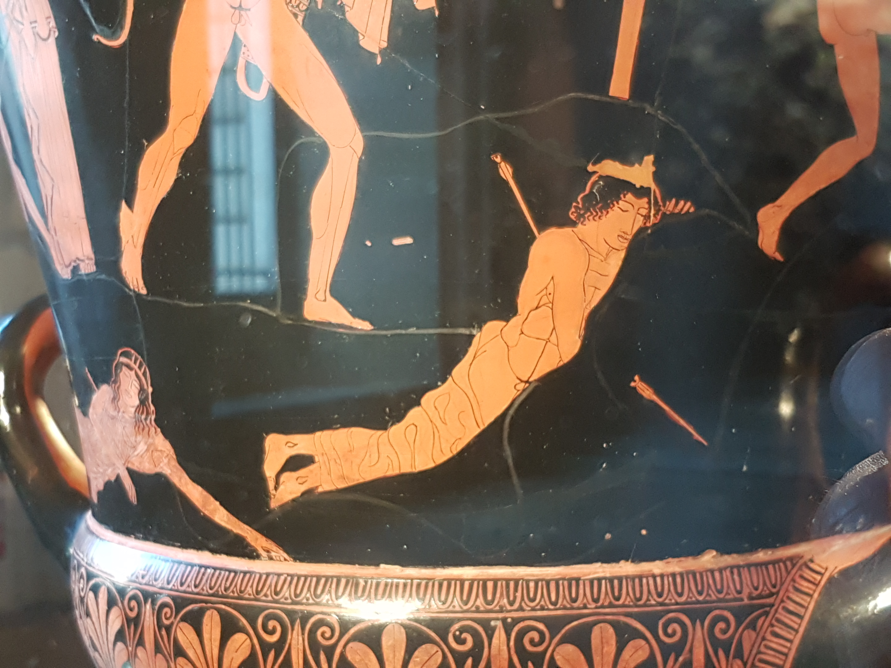 Niobid Krater. Face B (massacre of the Niobids).